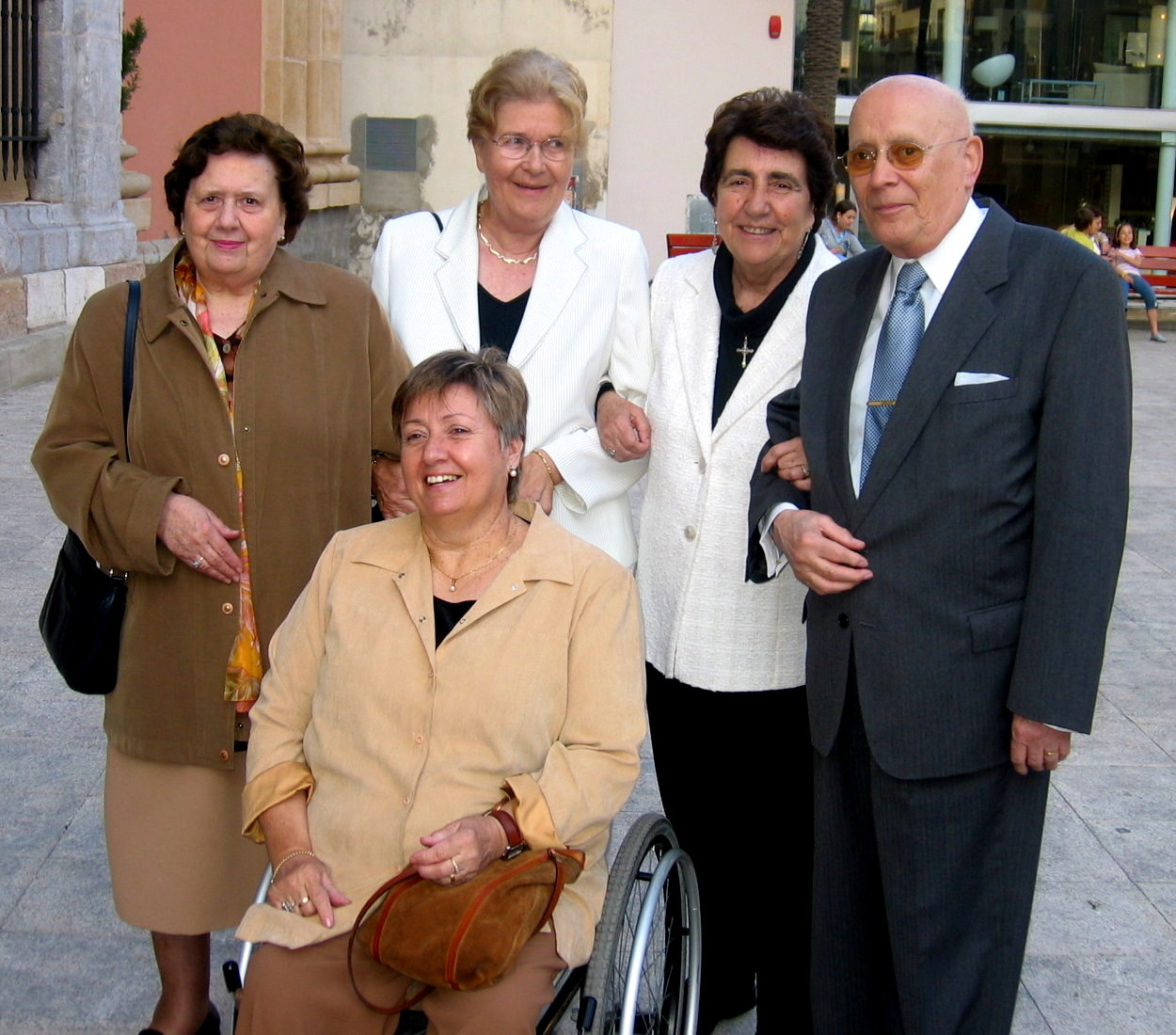 Lluís Martí i Bosch amb vàries de les seves col.laboradores d'Auxilia